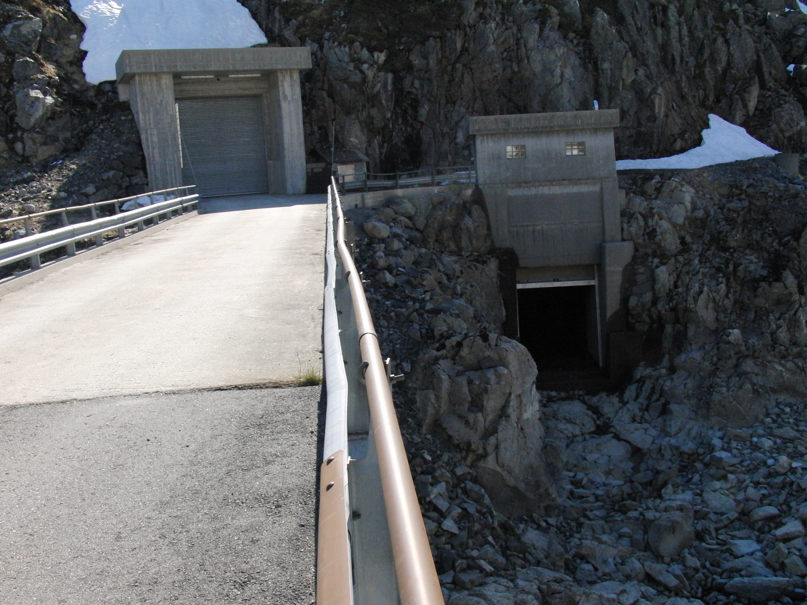 Blåfalli V kraftverk